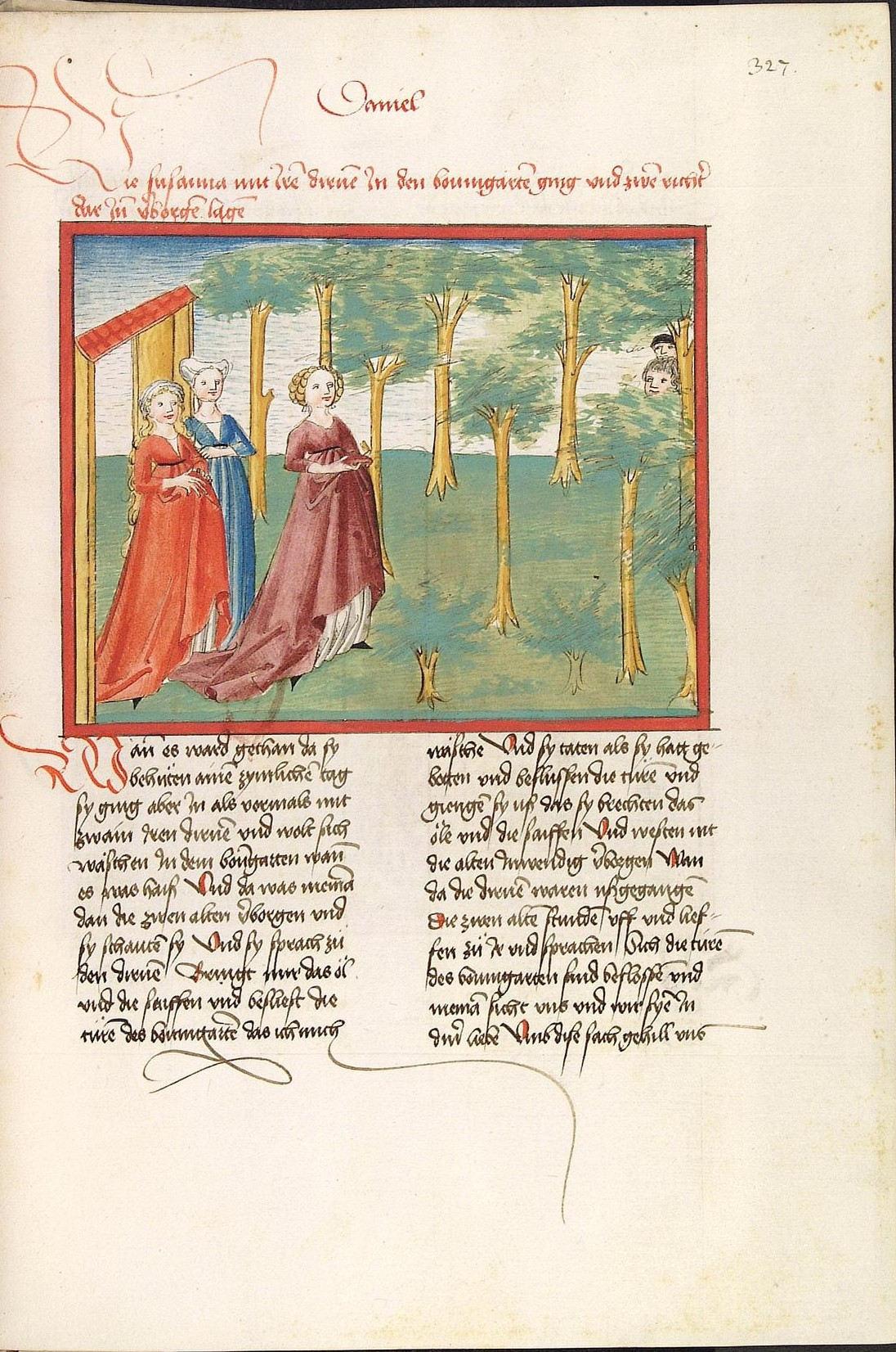 Codex Palatinus germanicus 18, Blatt 327r - Bibel, Altes Testament, Buch Daniel: Susanna geht mit Dienerinnen in den Garten zum Baden, in den Büschen lauern die beiden Alten. (Cpg 18 = Bibel AT, deutsch: Psalter, Parabole, Ecclesiastes, Cantica canticorum, Sapienta, Ecclesiasticus, Propheten)